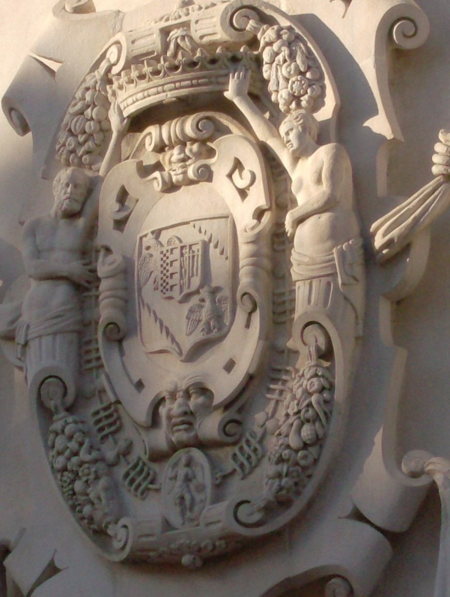 Il Palazzo Bentivoglio a Ferrara in via Garibaldi